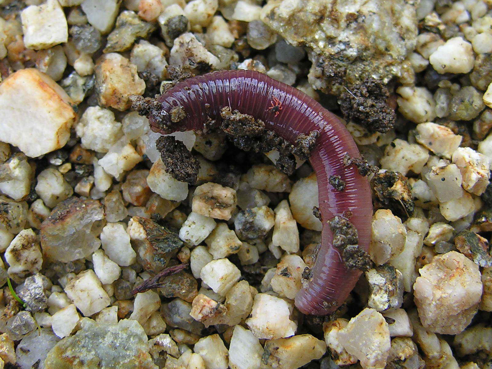 self made Vigo - Galicia - Spain - 06-10-2006